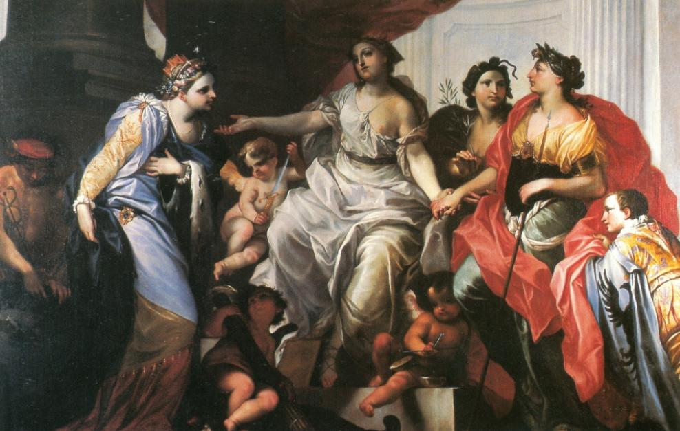 Gerechtigkeit und Frieden verbinden Italien und Deutschland durch den Handel (1698)title QS:P1476,de:"Gerechtigkeit und Frieden verbinden Italien und Deutschland durch den Handel (1698)" label QS:Lde,"Gerechtigkeit und Frieden verbinden Italien und Deutschland durch den Handel (1698)"